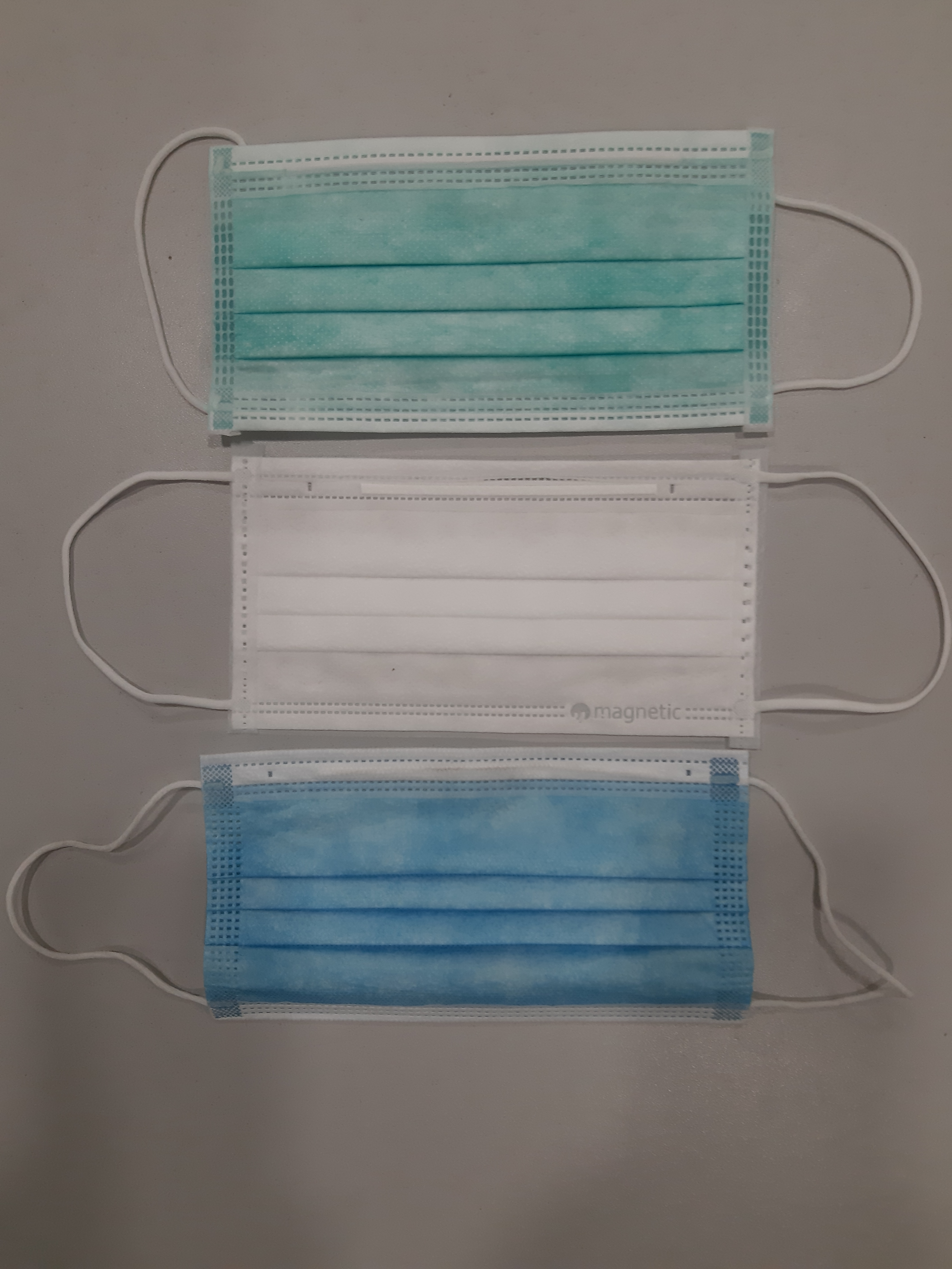 "Rouška nad zlato" - během pandemie K-viru se staly roušky (a podobné ochranné pomůcky) velice cenným a nedostatkovým artiklem.